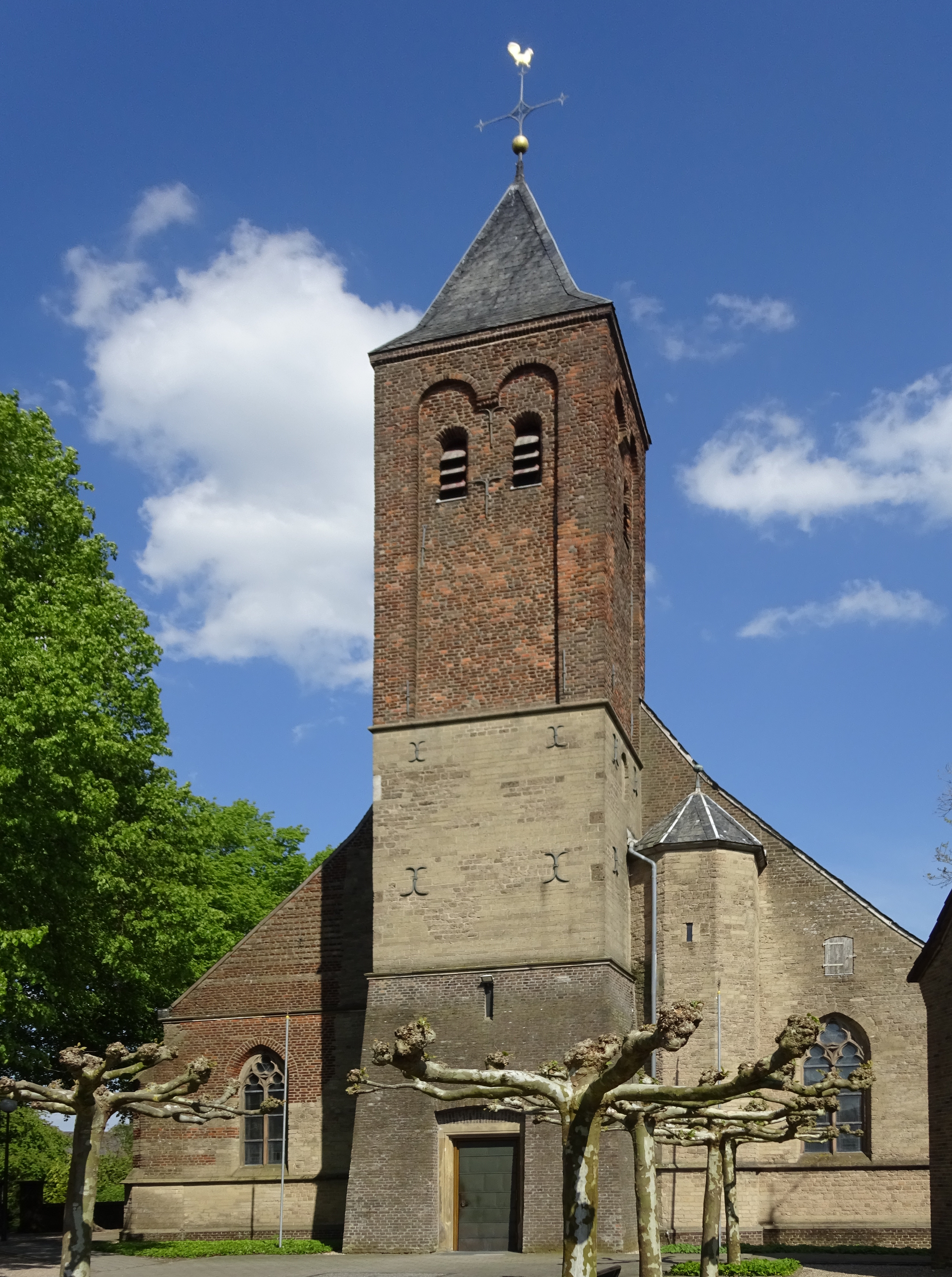 Rees-Bienen, St. Cosmas und Damian, overzicht westportaal en toren